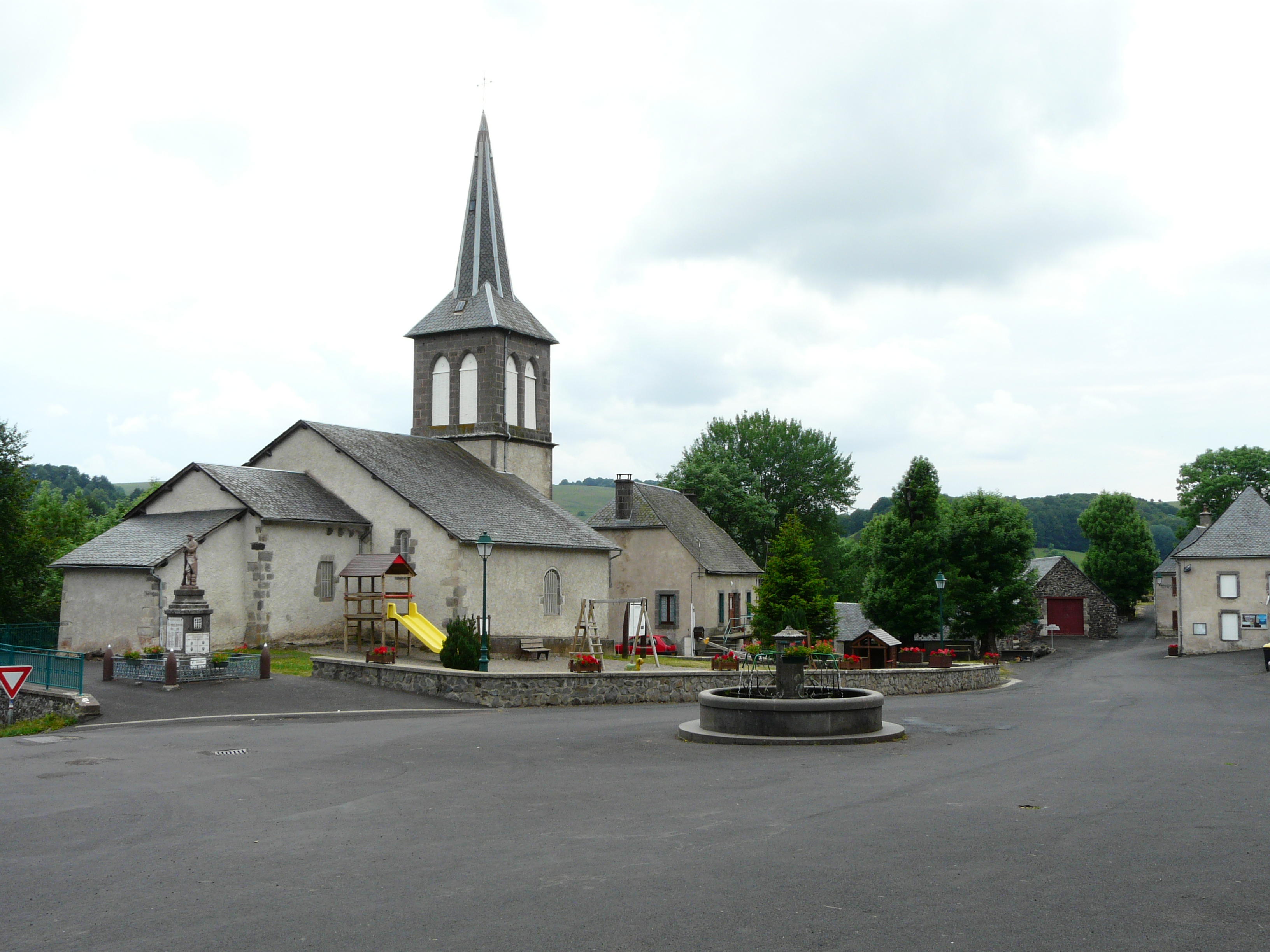 La place principale du village d'Espinchal, Puy-de-Dôme, France.